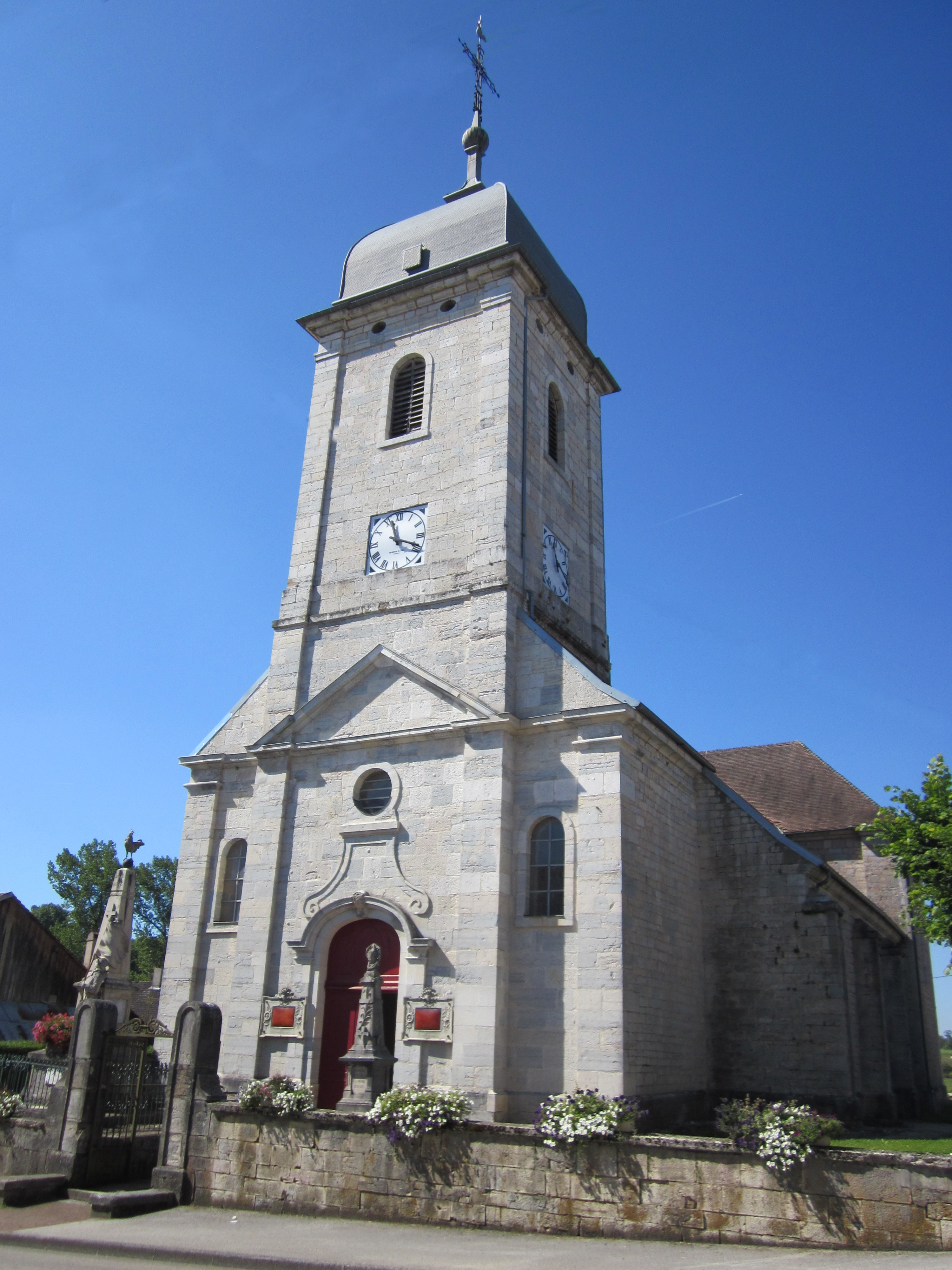 Nods (Doubs) - église de 1762